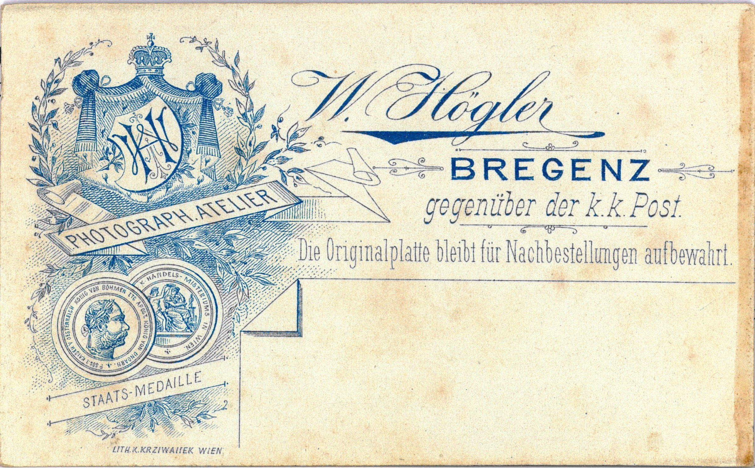 Visitenkartenportrait Fotorevers Photographisches Atelier W. Högler Bregenz vis a vis der KK .